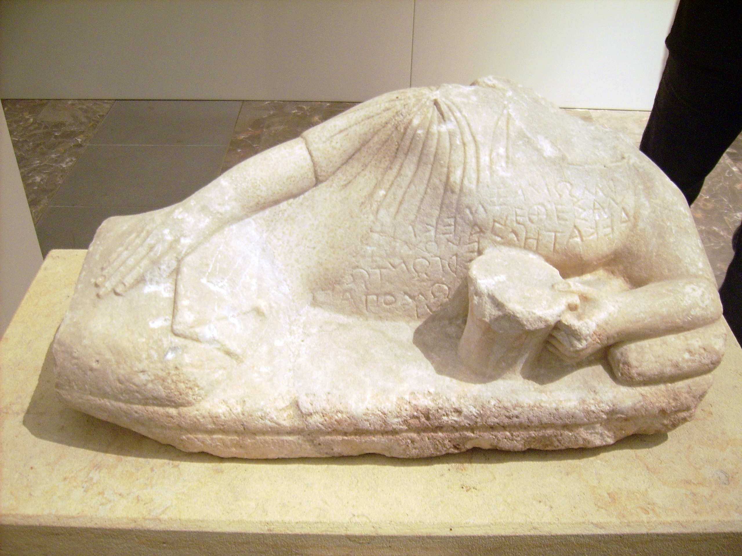 Weihgeschenk des Hermonax und seines Kindes an Apollo mit Weihinschrift; Mitte 6. Jh. v. Chr., aus Myus; weißer Marmor; Höhe 17 cm, Breite 37 cm; Inv.-Nr.: Sk 1673, Antikensammlung Berlin/Altes Museum